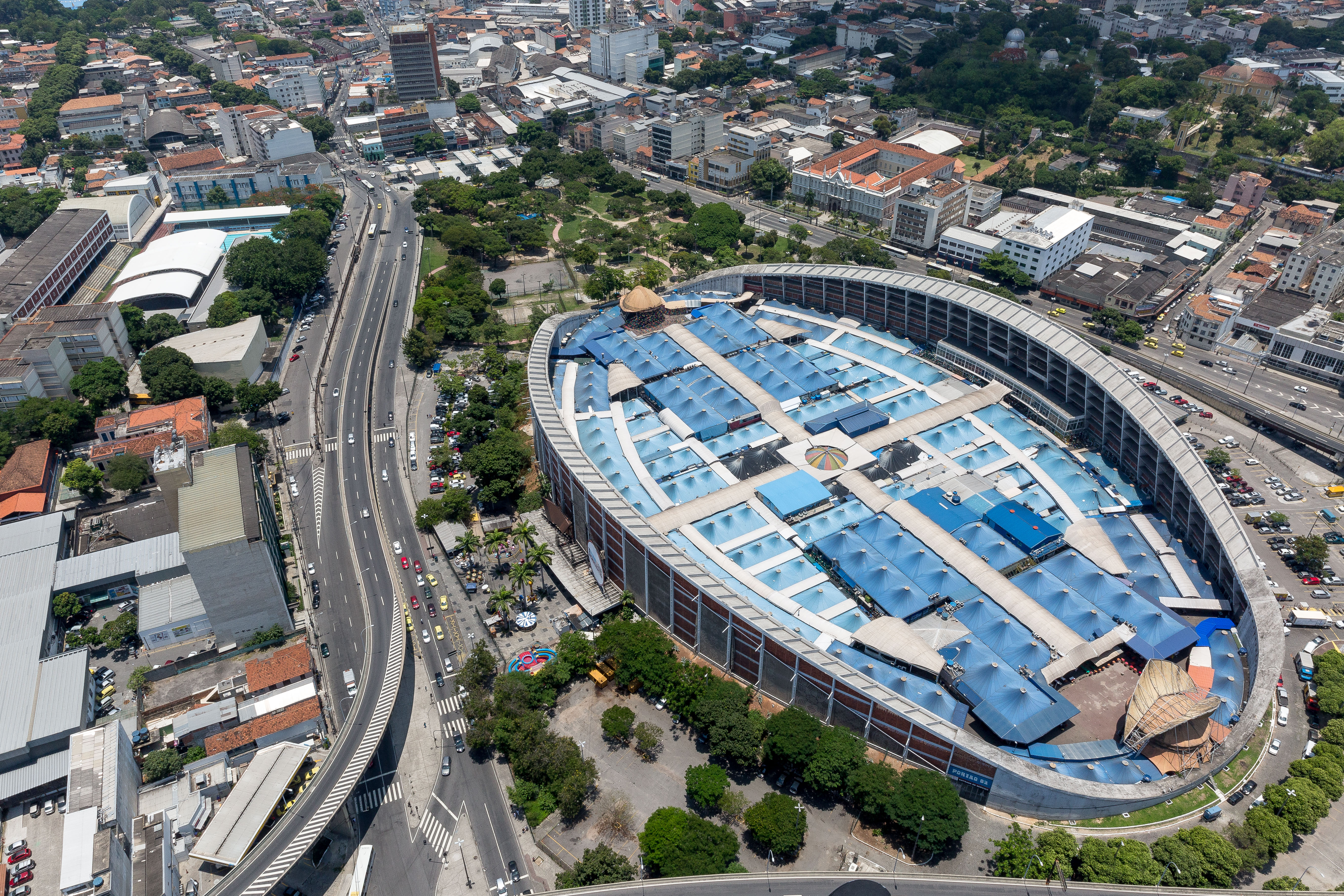 Vista aérea do mercado de São Cristovão na cidade do Rio de Janeiro.